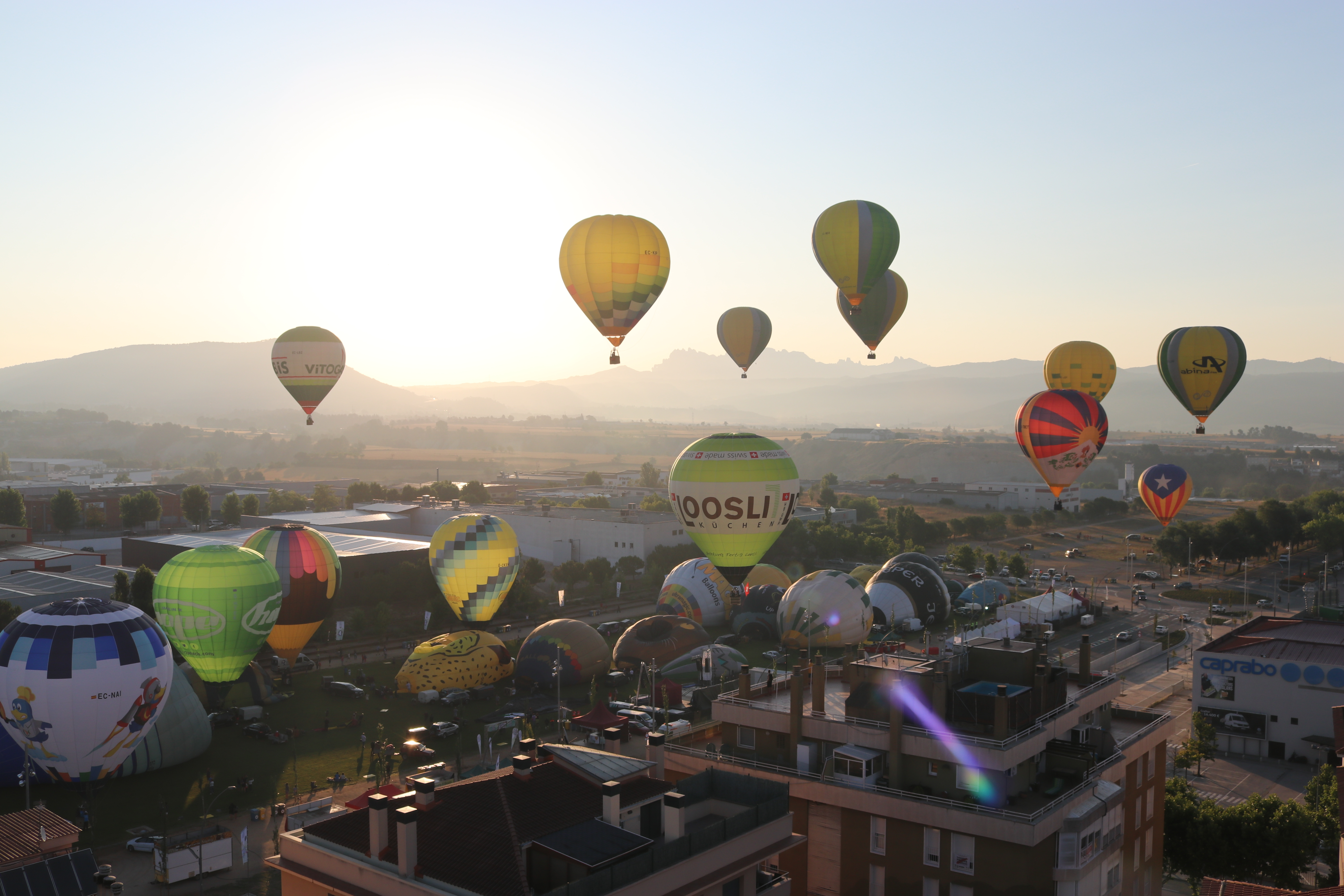 Vol de premsa, European Balloon Festival 2019